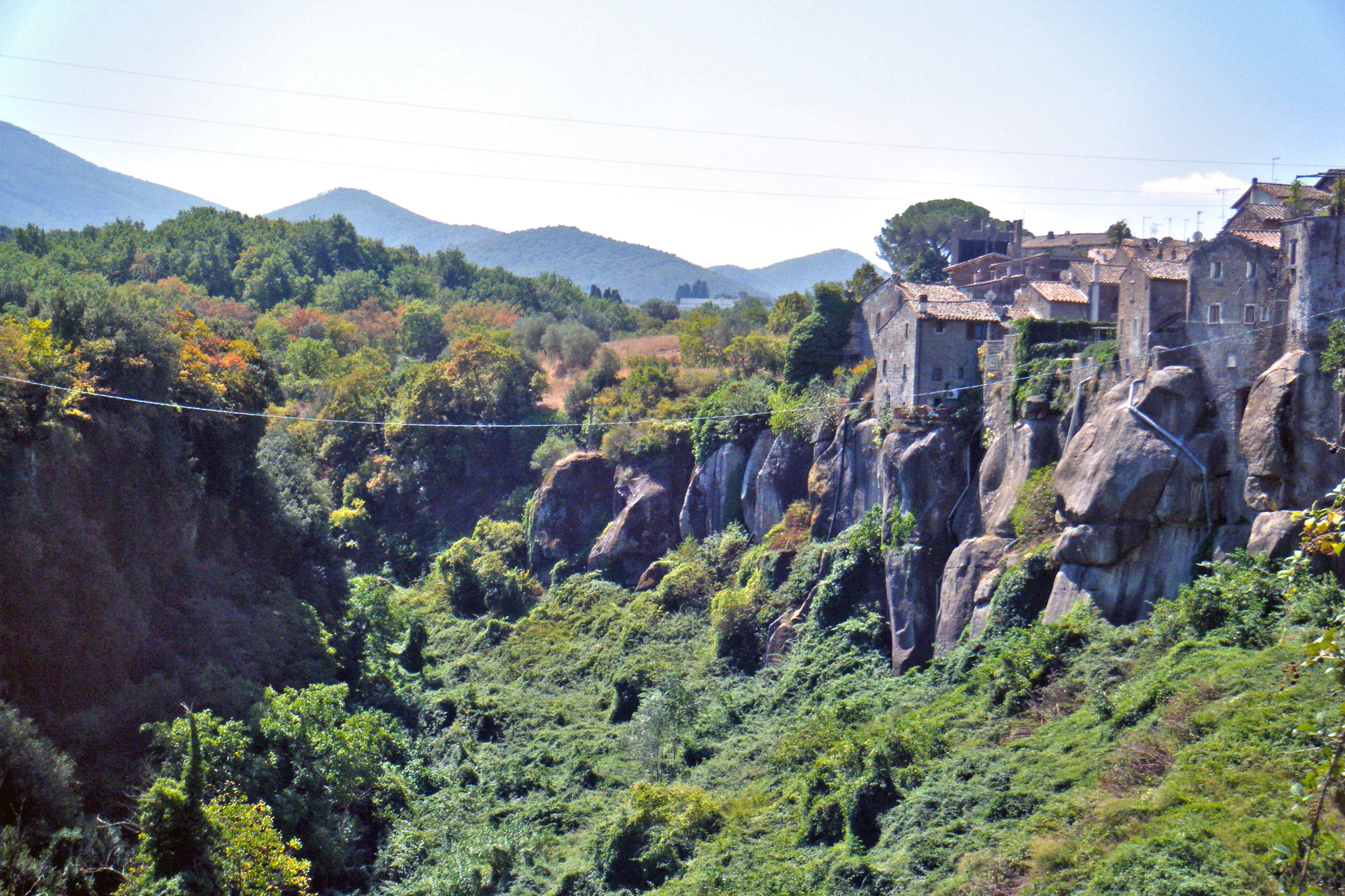 Monte Cimino (versante nord) (Q61861486)Panorama da Vitorchiano